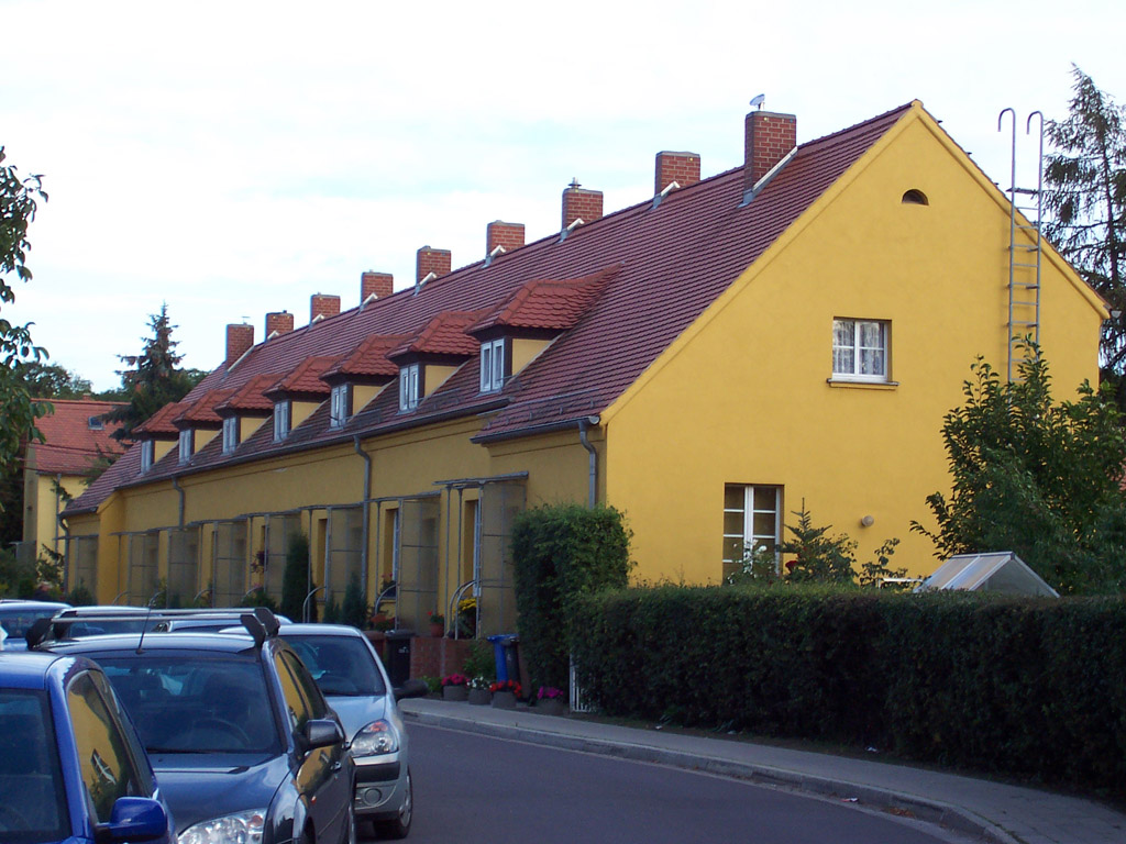 Der Bunte Weg in der Gartenstadt Reform, Magdeburg